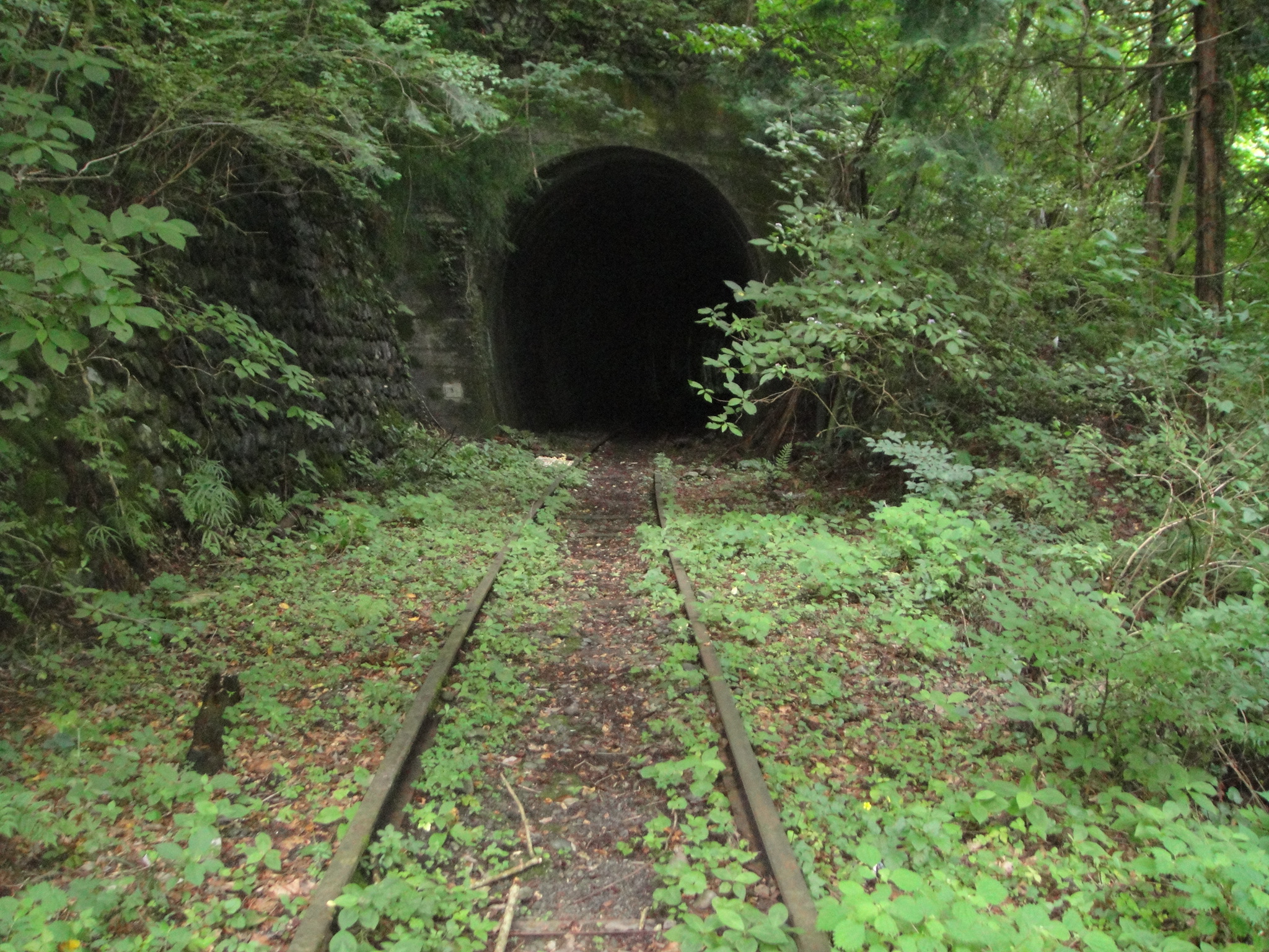 第一氷川トンネル